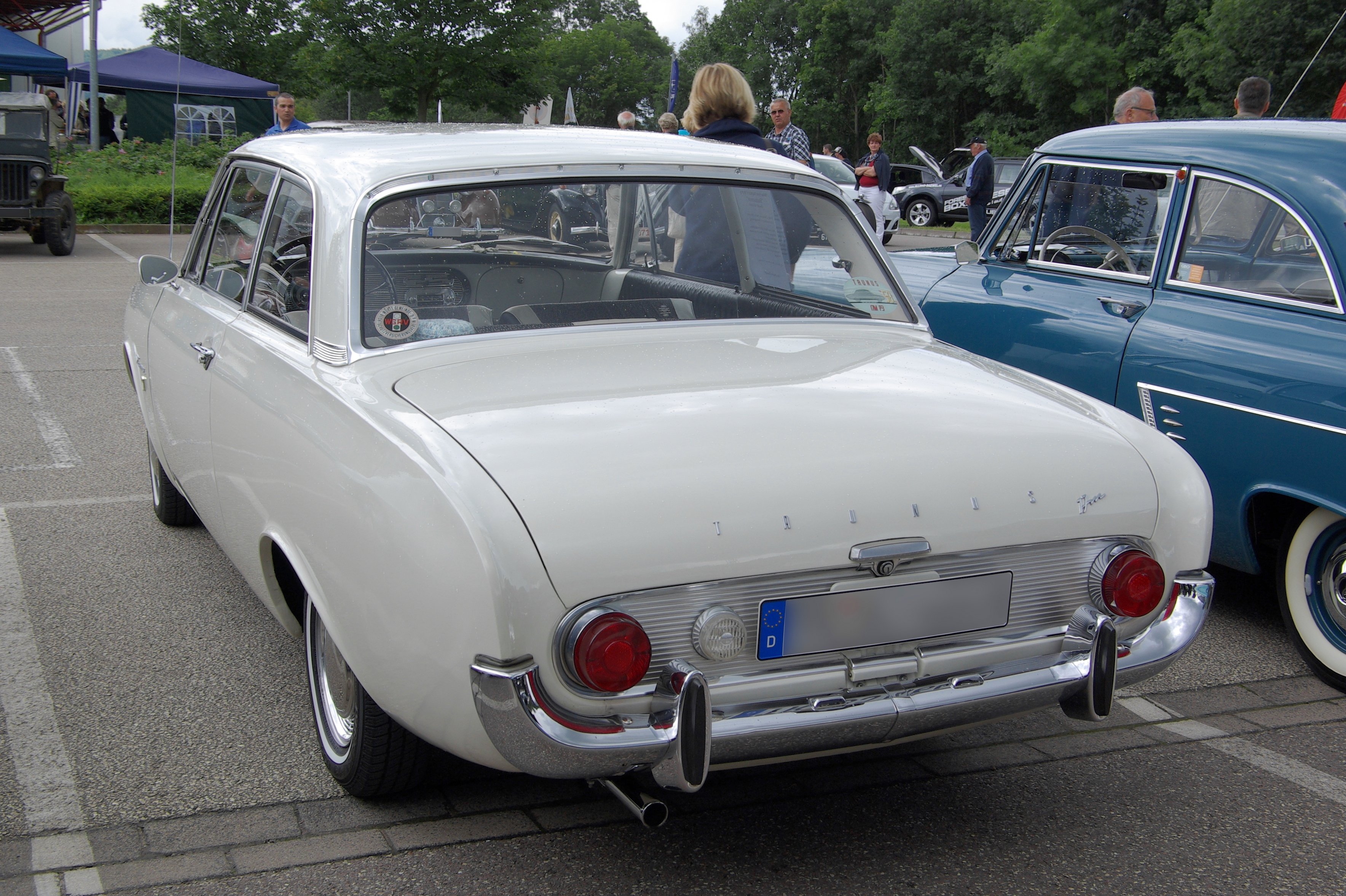 Ford Taunus 17 m, Baujahr 1964, 55 PS 28. Internationales Oldtimer-Treffen, Konz